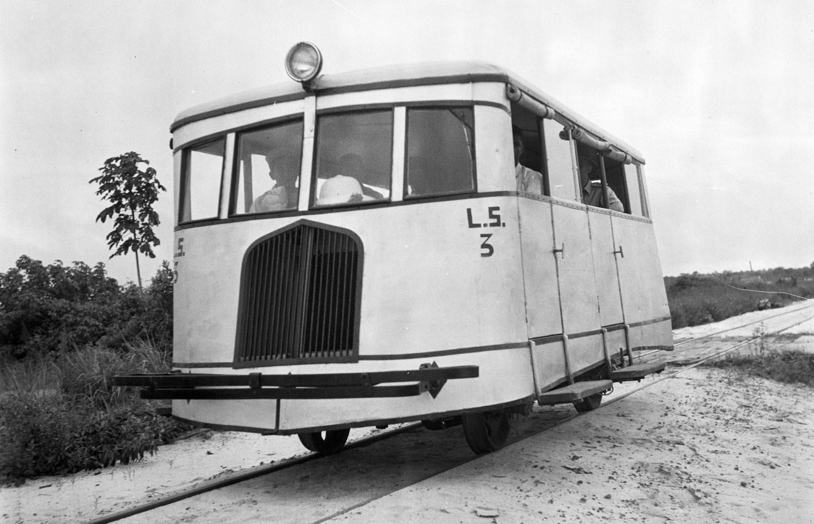 Collectie / Archief: Fotocollectie Van de Poll Reportage / Serie: Reis naar Suriname en de Nederlandse Antillen Beschrijving: Een voertuig op rails, ergens in Suriname Datum: 1947 Locatie: Suriname Trefwoorden: vervoermiddelen Fotograaf: Poll, Willem van de Auteursrechthebbende: Nationaal Archief CC-BY Nummer archiefinventaris: bekijk toegang 2.24.14.02 Bestanddeelnummer: 252-5992